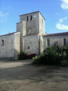 Preĝejo de Bazoges-en-Pareds